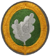 Bundeswehr-Sonderabzeichen für Spezialisierte Kräfte des Heeres mit Erweiterter Grundbefähigung für Spezielle Operationen